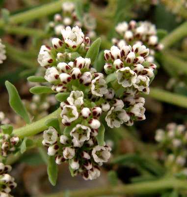 Corrigiola littoralis, Angers, France